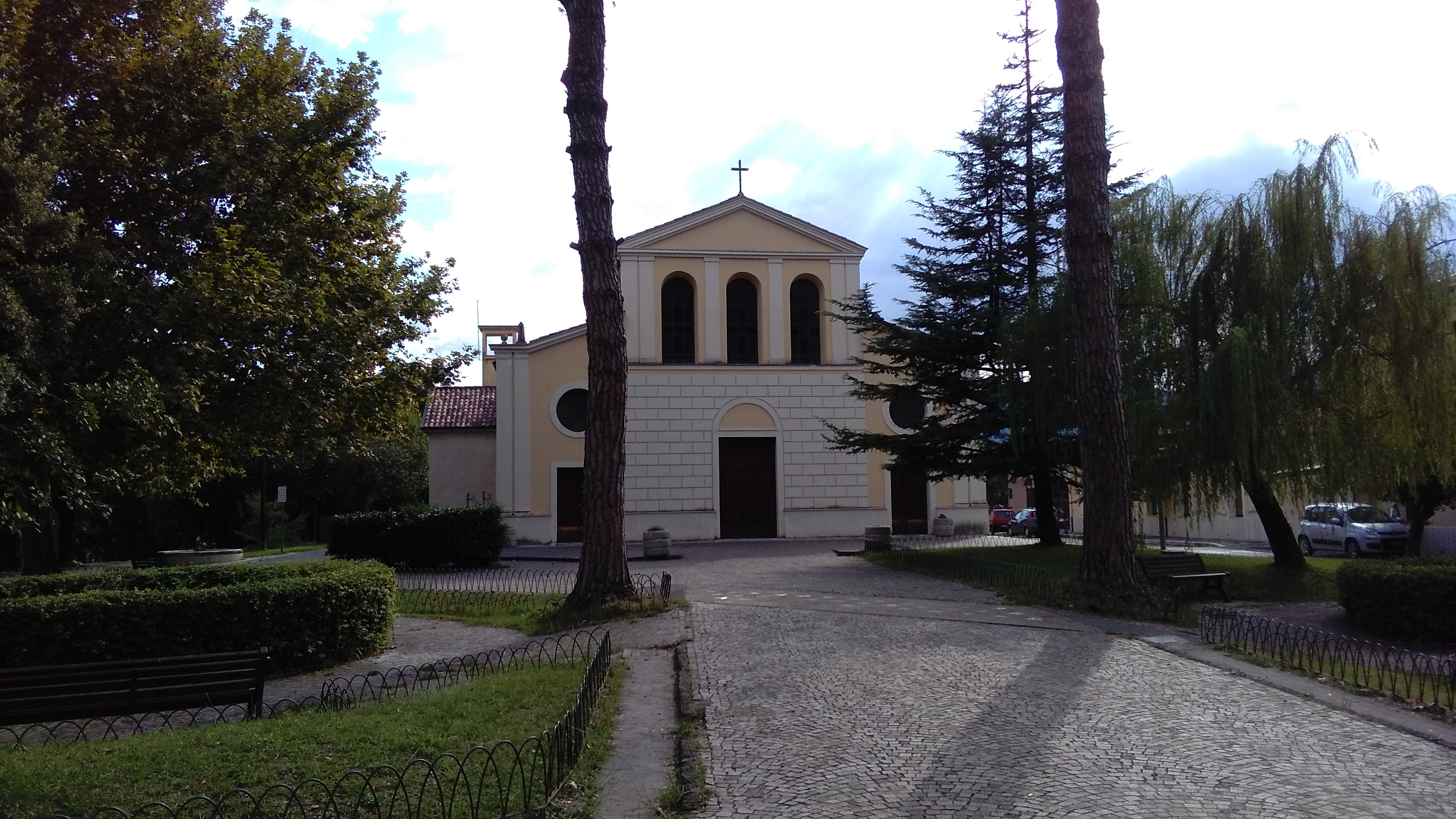 Chiesa di San Sebastiano a Sant'Elia Fiumerapido